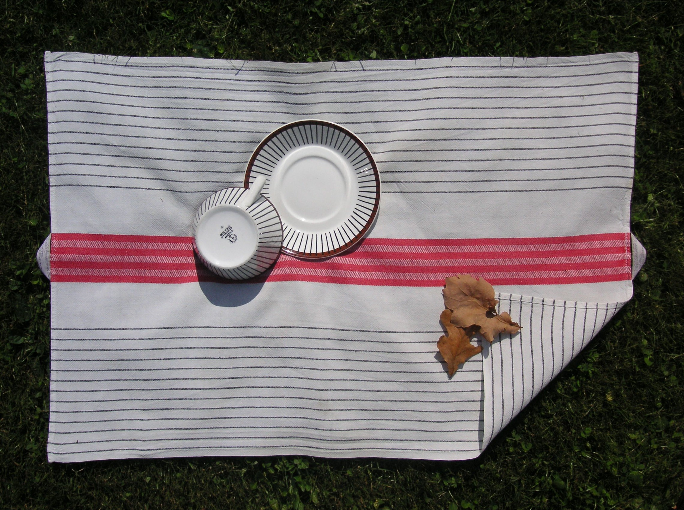 Astrid Sampes kökshandduk "Kökstrivsel" med Stig Lingbergs kopp "Spisa Ribb"